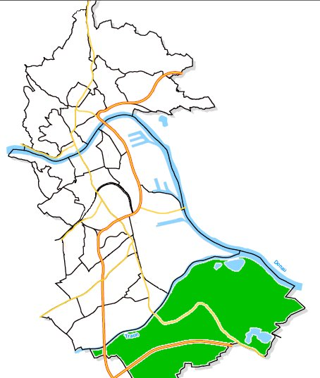 Städtische Bezirke Linz - Ebelsberg hervorgehoben. Selbst gezeichnet auf Grundlage von: "Stadtforschung Linz: Linz 2000. Fakten, Bilder, Grafiken."" (der greg:) 26.5.2005 - Lizenz: CC-BY